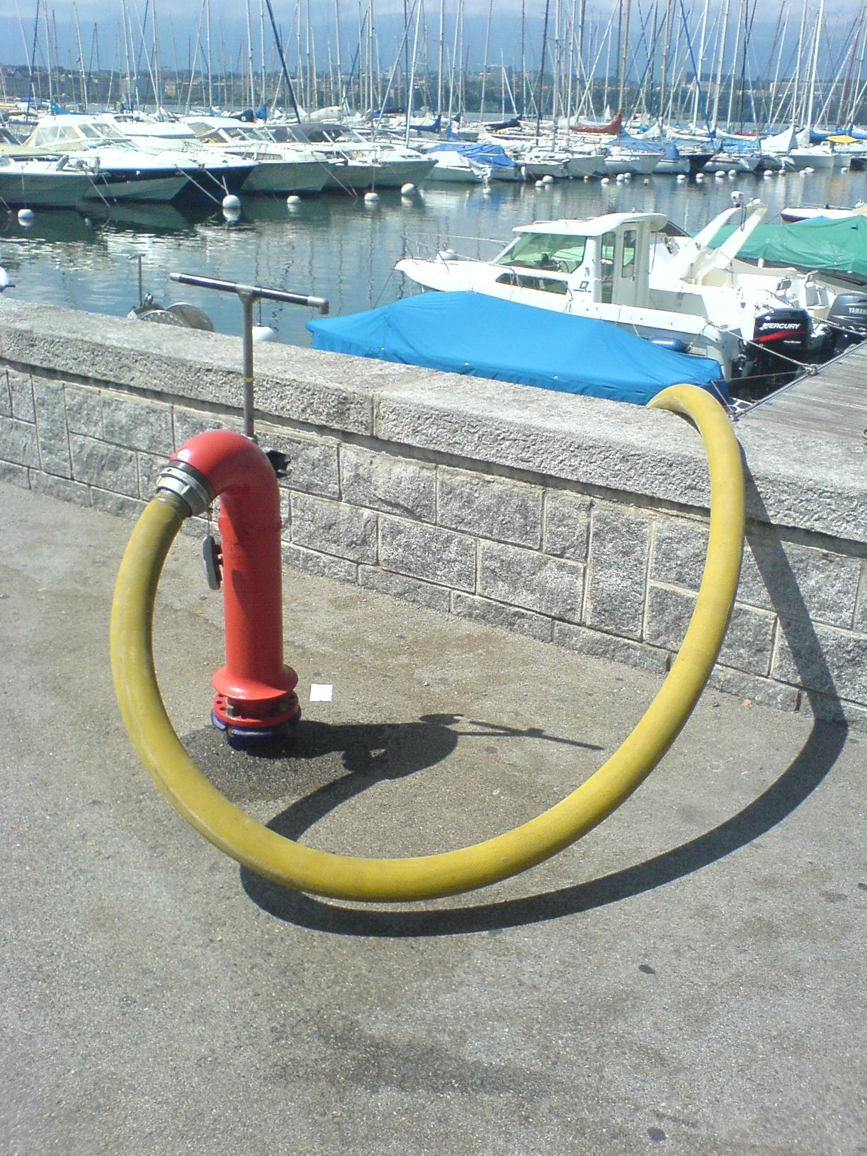 Un poteau incendie (modèle Hinni 6006) à Genève alimentant une tonne-pompe du SIS Genève via un tuyau de 75mm.